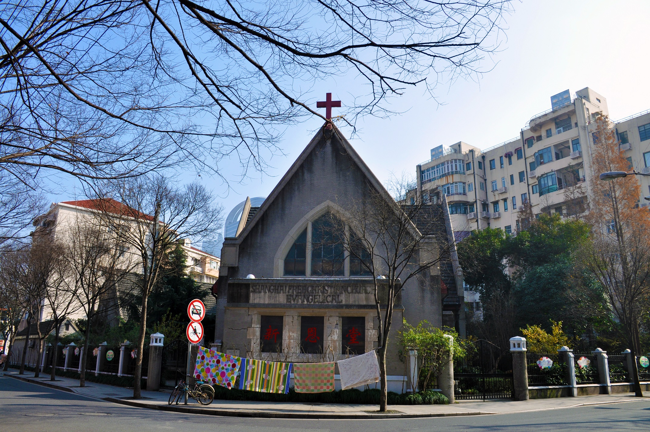 新恩堂、上海公共礼拜堂、基督教新教堂 乌鲁木齐北路25号